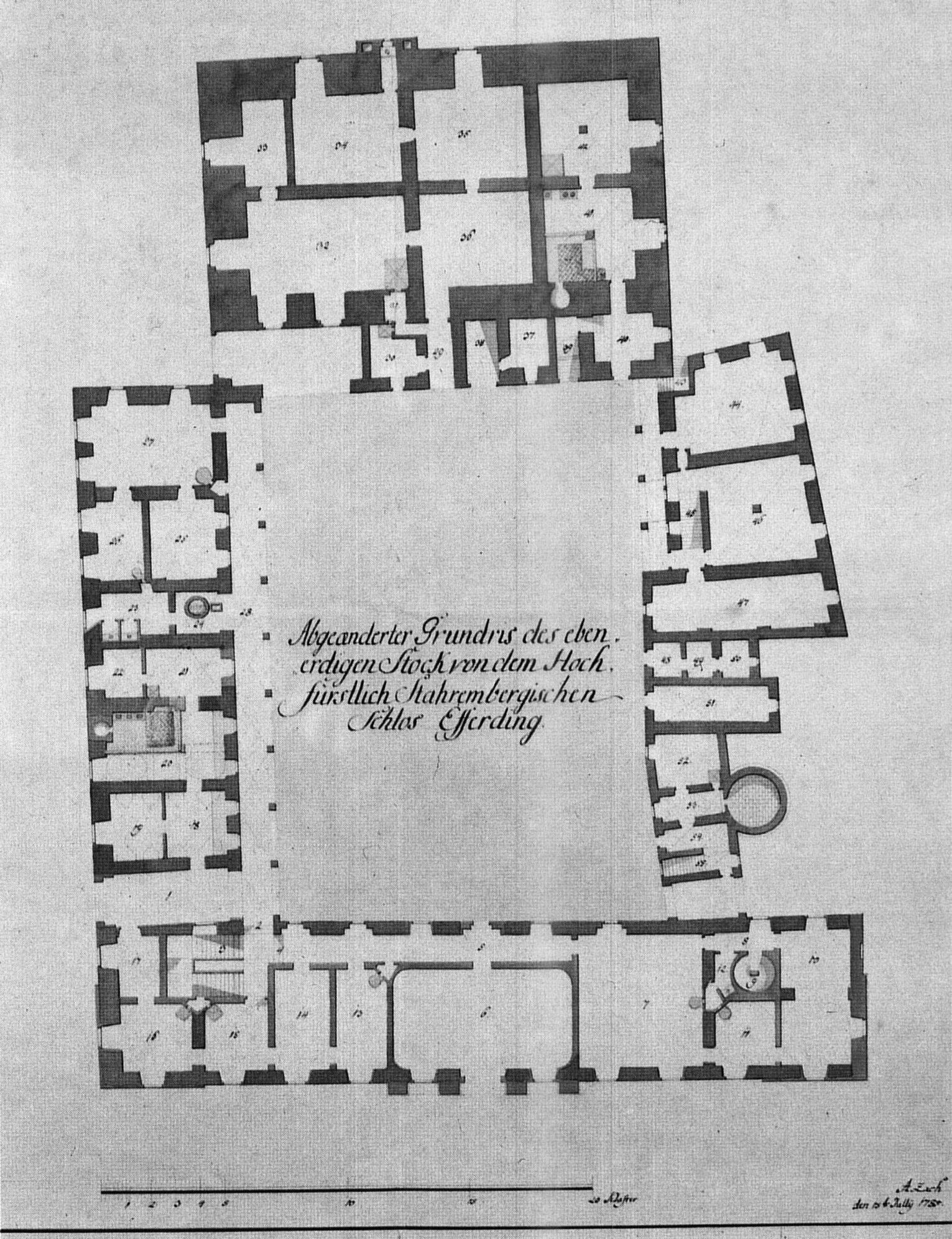 Grundriss des Erdgeschosses im Schloss Starhemberg in Eferding nach dem Umbau 1875-1788